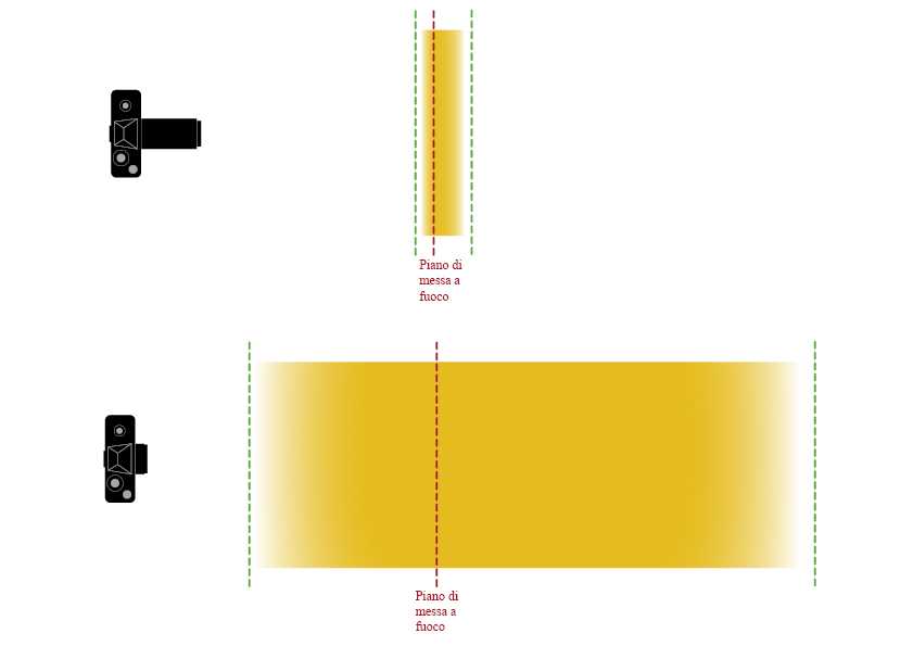 Variare la profondità di campo usando la lunghezza focale